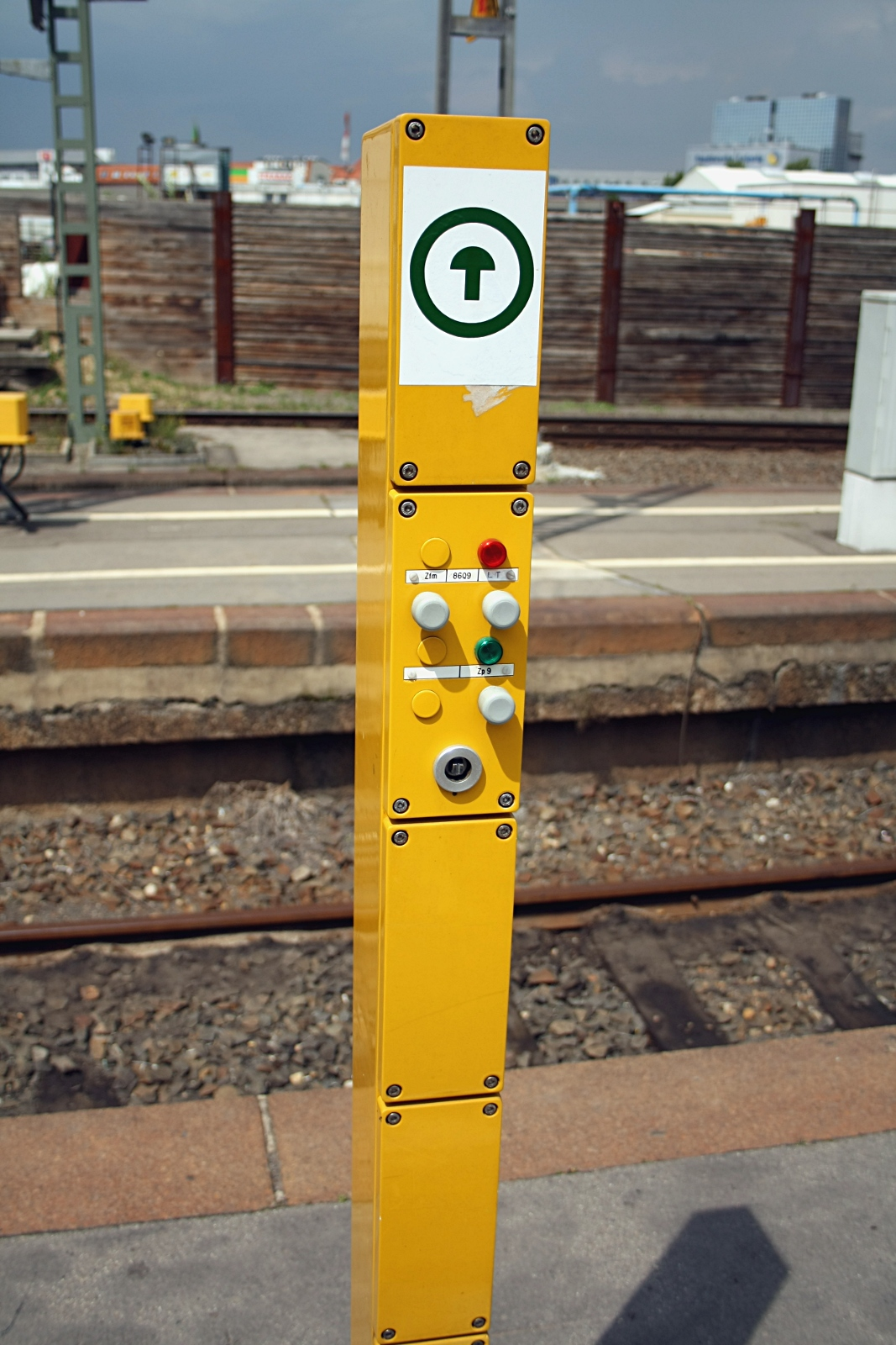 Bediensäule für Zugpersonal mit Zp9-Signal (Leipzig Hauptbahnhof).